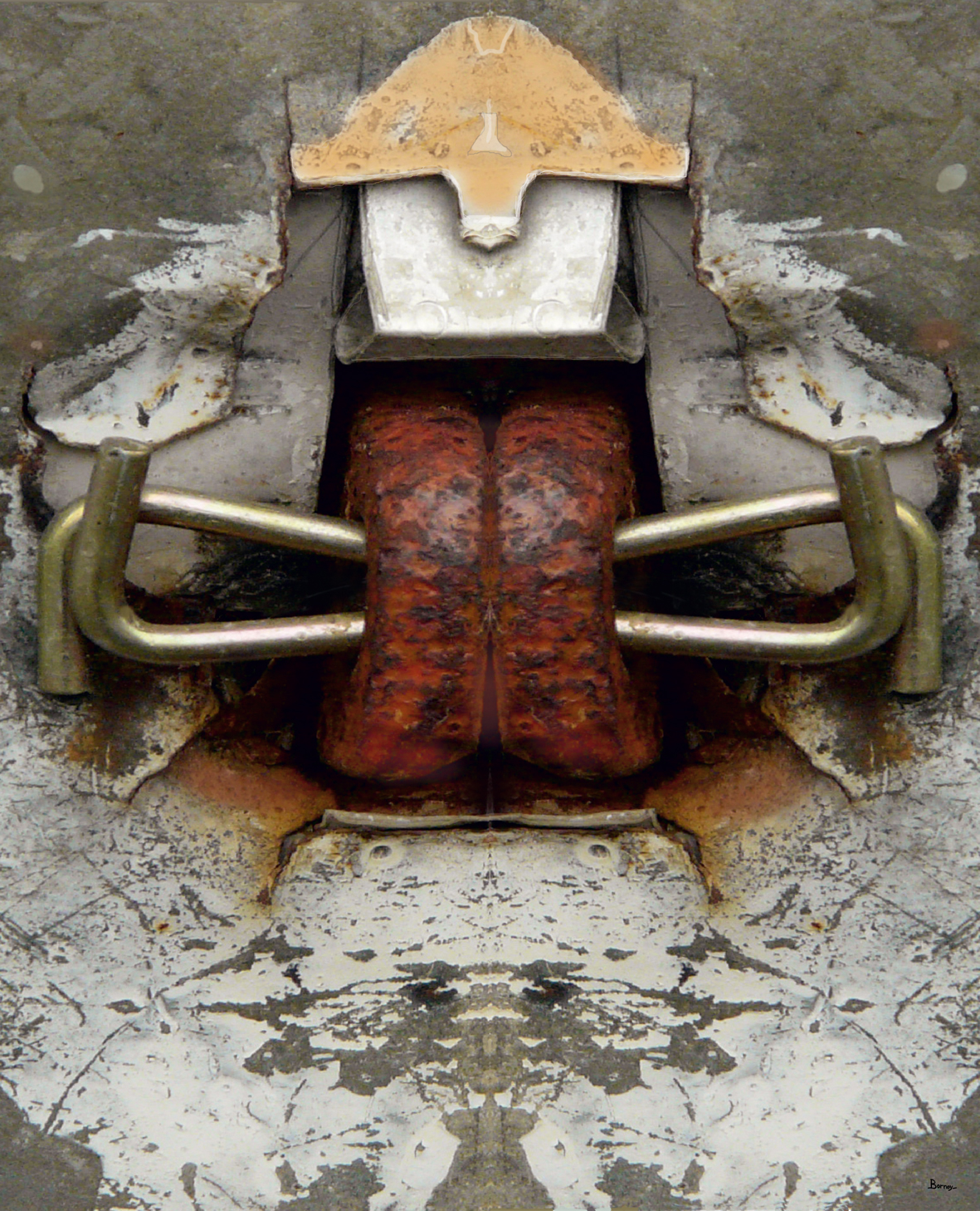 2016 ORNAMENTOS BEZMILIANA